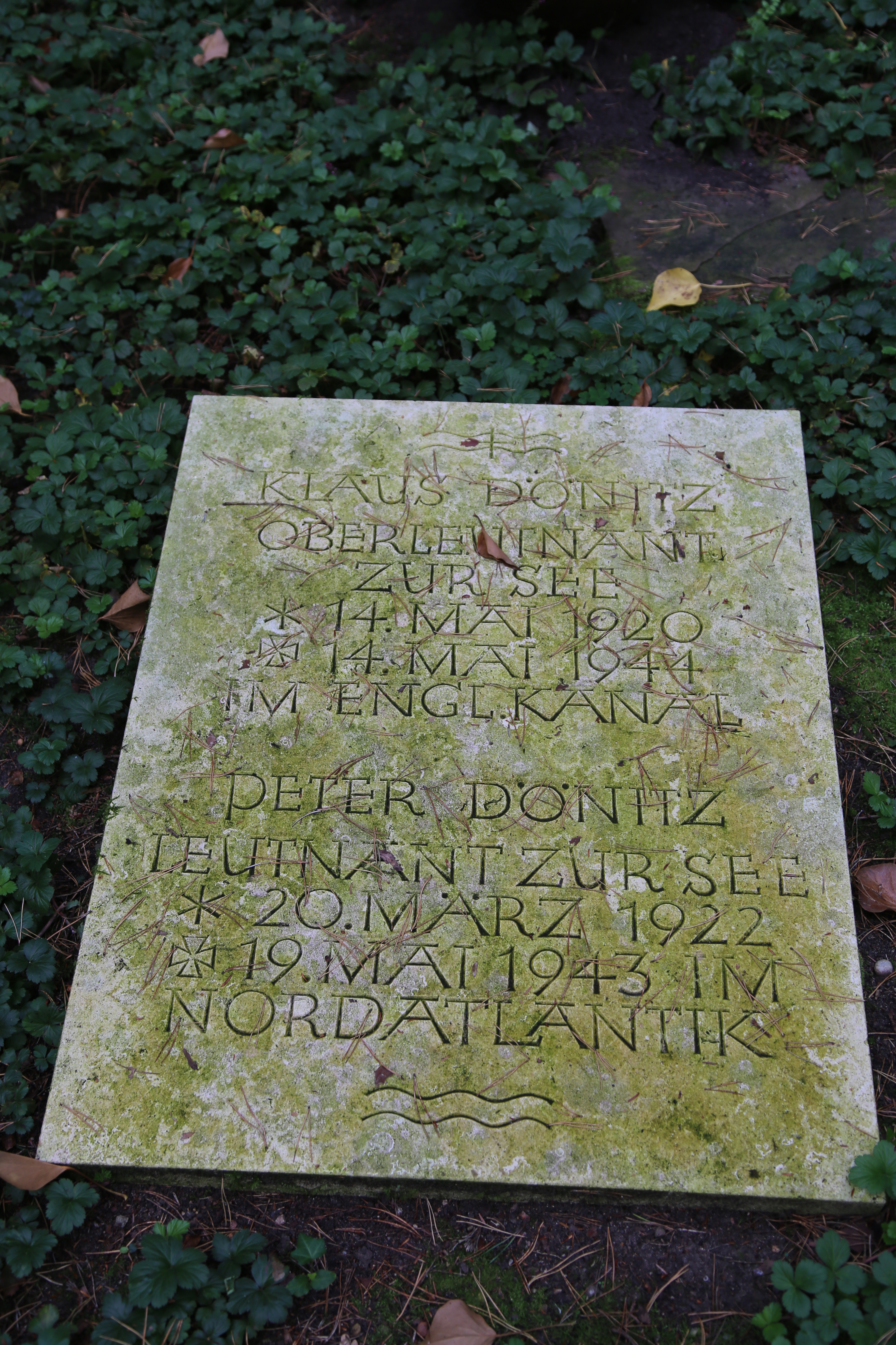 Karl Dönitz' Söhne sind beide im Zweiten Weltkrieg gefallen: Leutnant zur See Peter Dönitz am 19. Mai 1943 als Wachoffizier auf U 954, Oberleutnant zur See Klaus Dönitz am 13. Mai 1944 auf dem Schnellboot S 141.